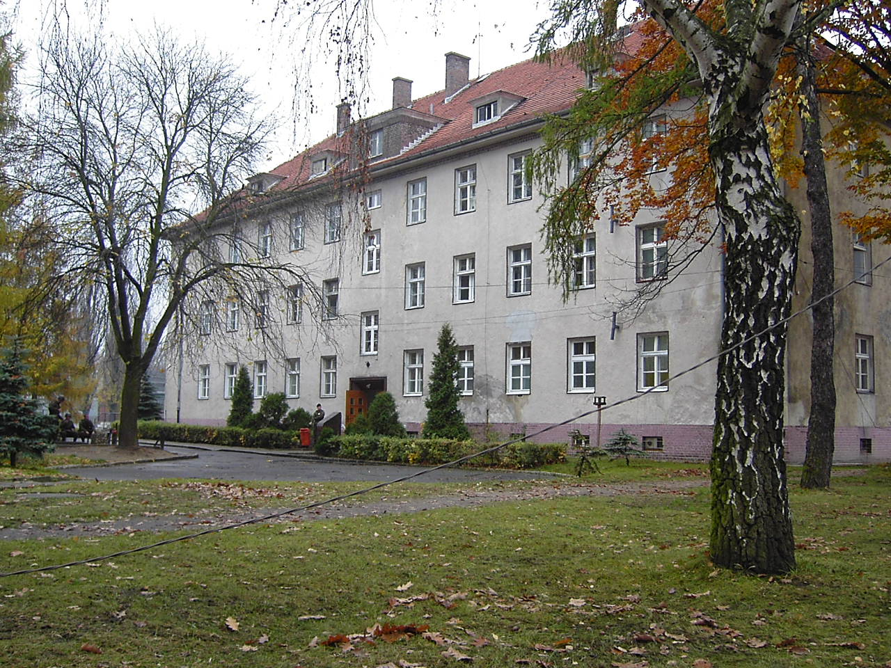 Sztab 5 bsap 4 DZ z Krosna Odrzańskiego. Zdjecie późniejsze